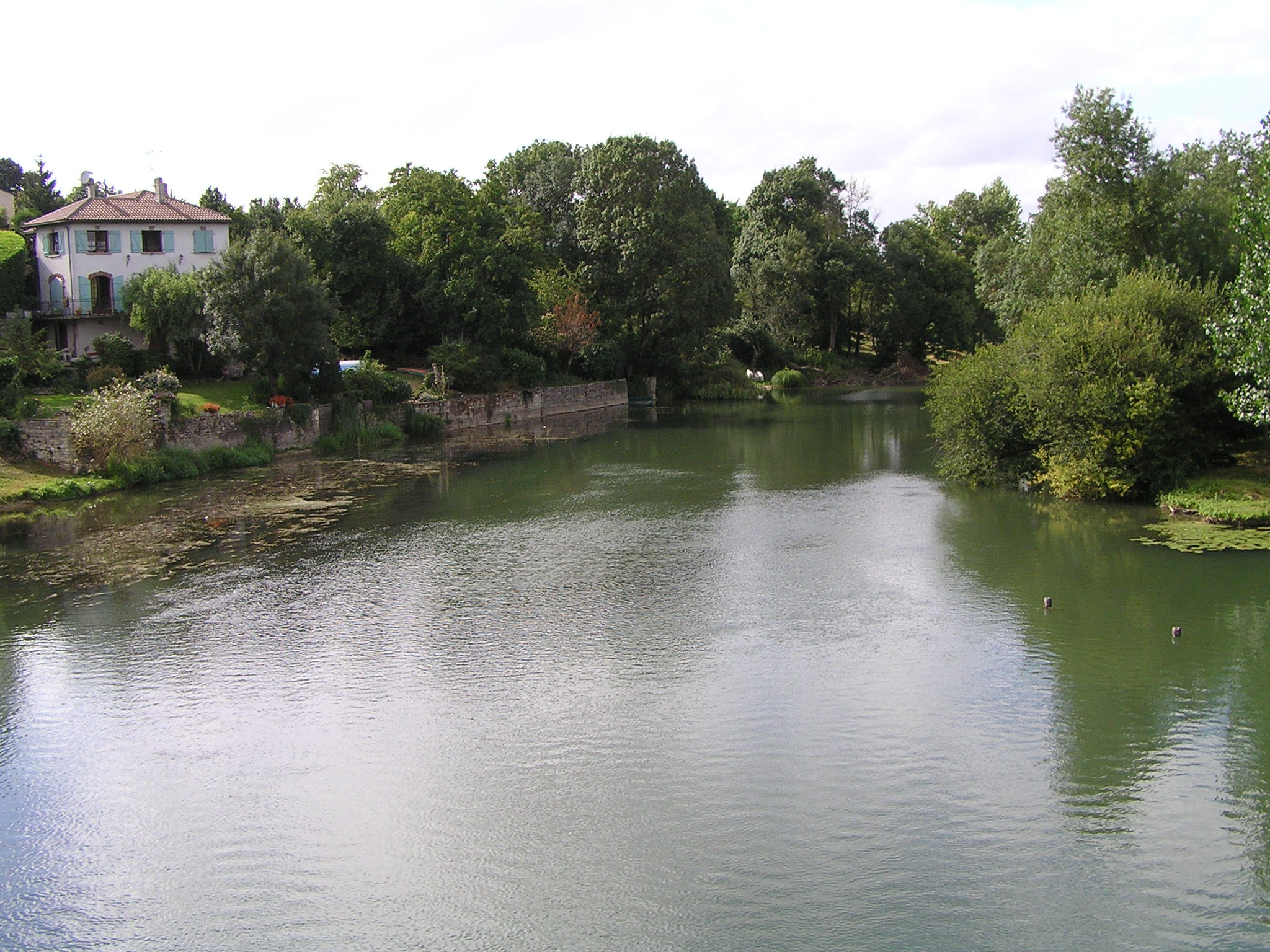 Charente à Ambérac, Charente, France